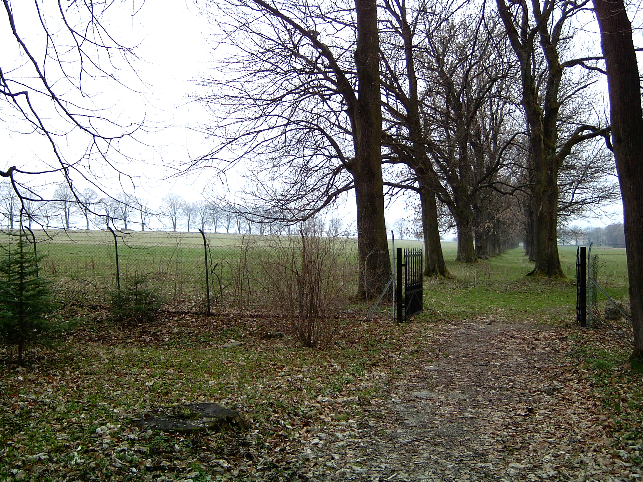 Mošovská alej.